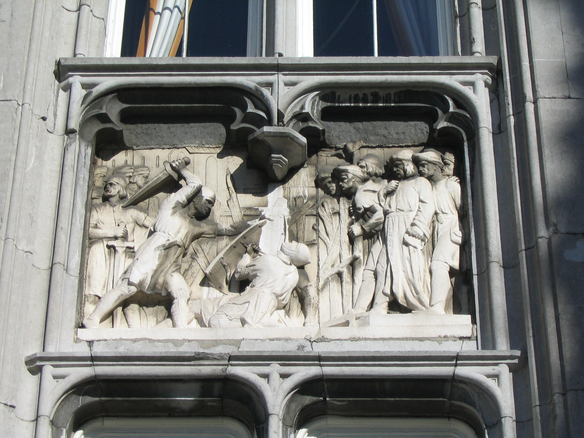 Détail façade Palais provincial de Liège: Le duel d'Aynechon et de Falloz en 1296, épisode de la guerre civile des Awans et des Waroux